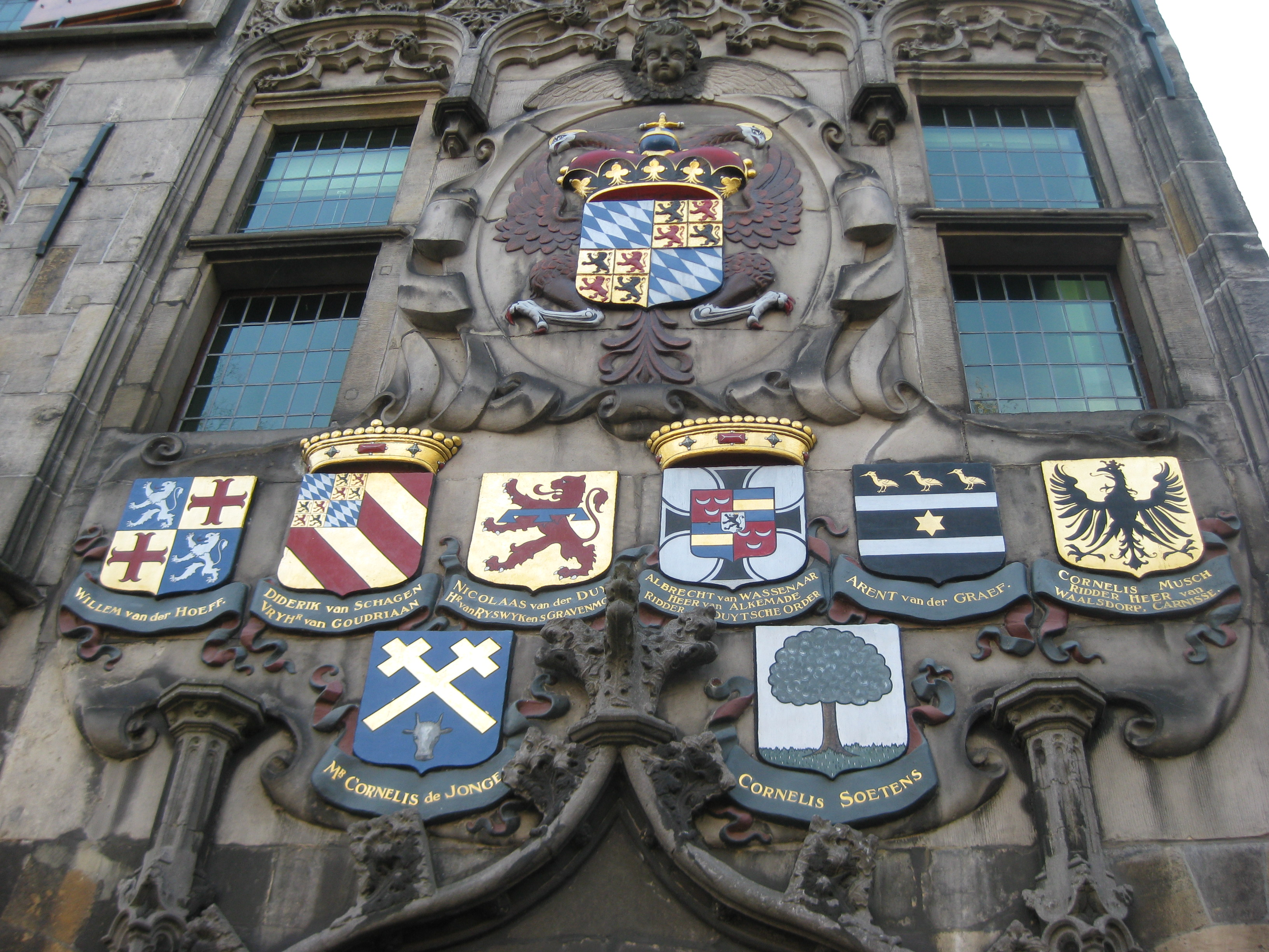 Wapens op de gevel van het Gemeenlandshuis, Delft, Nederland